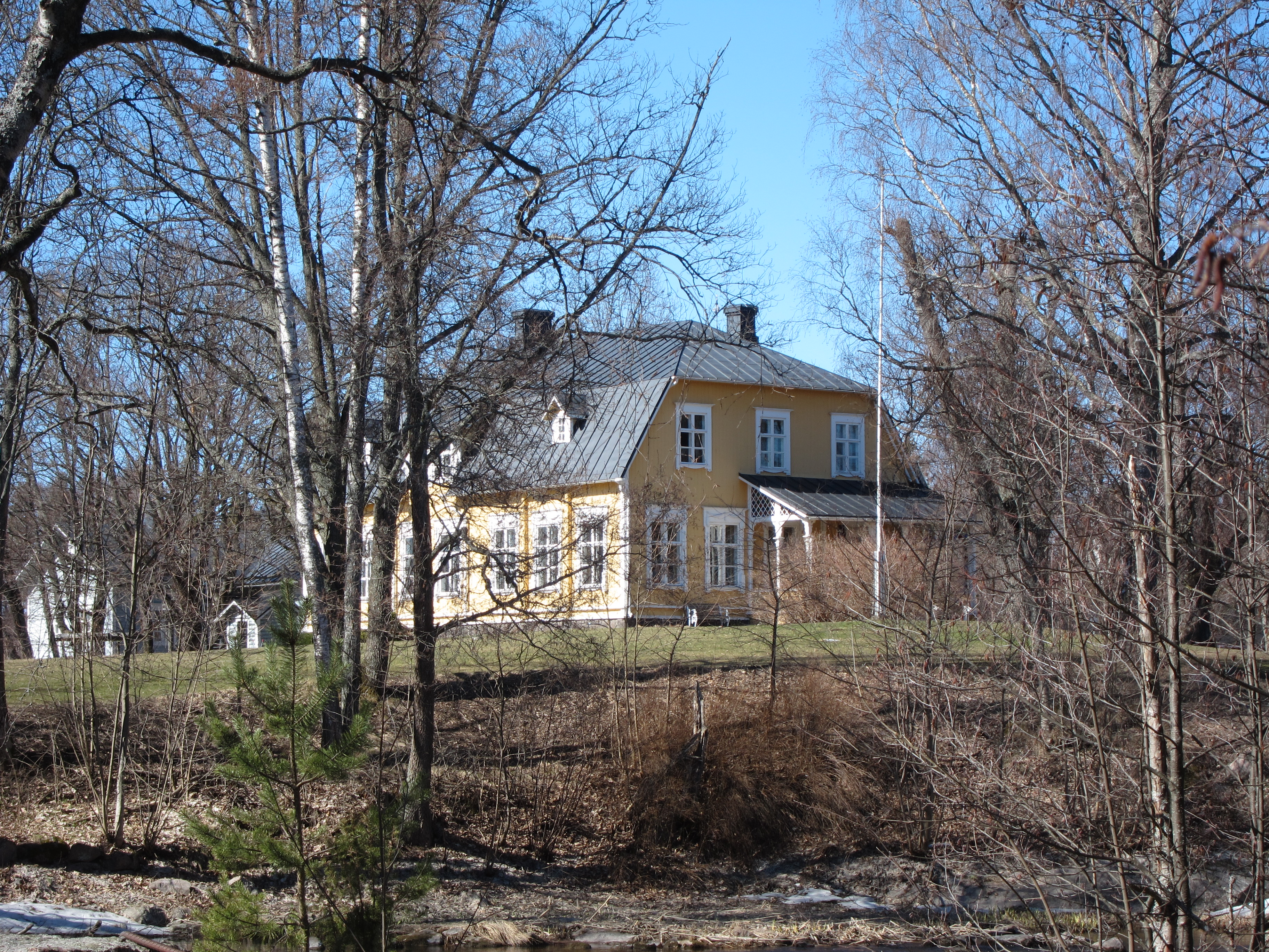 Kyminkartanon päärakennus Kotkassa.